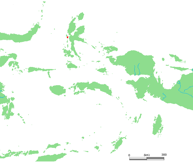 ID Tidore.PNG